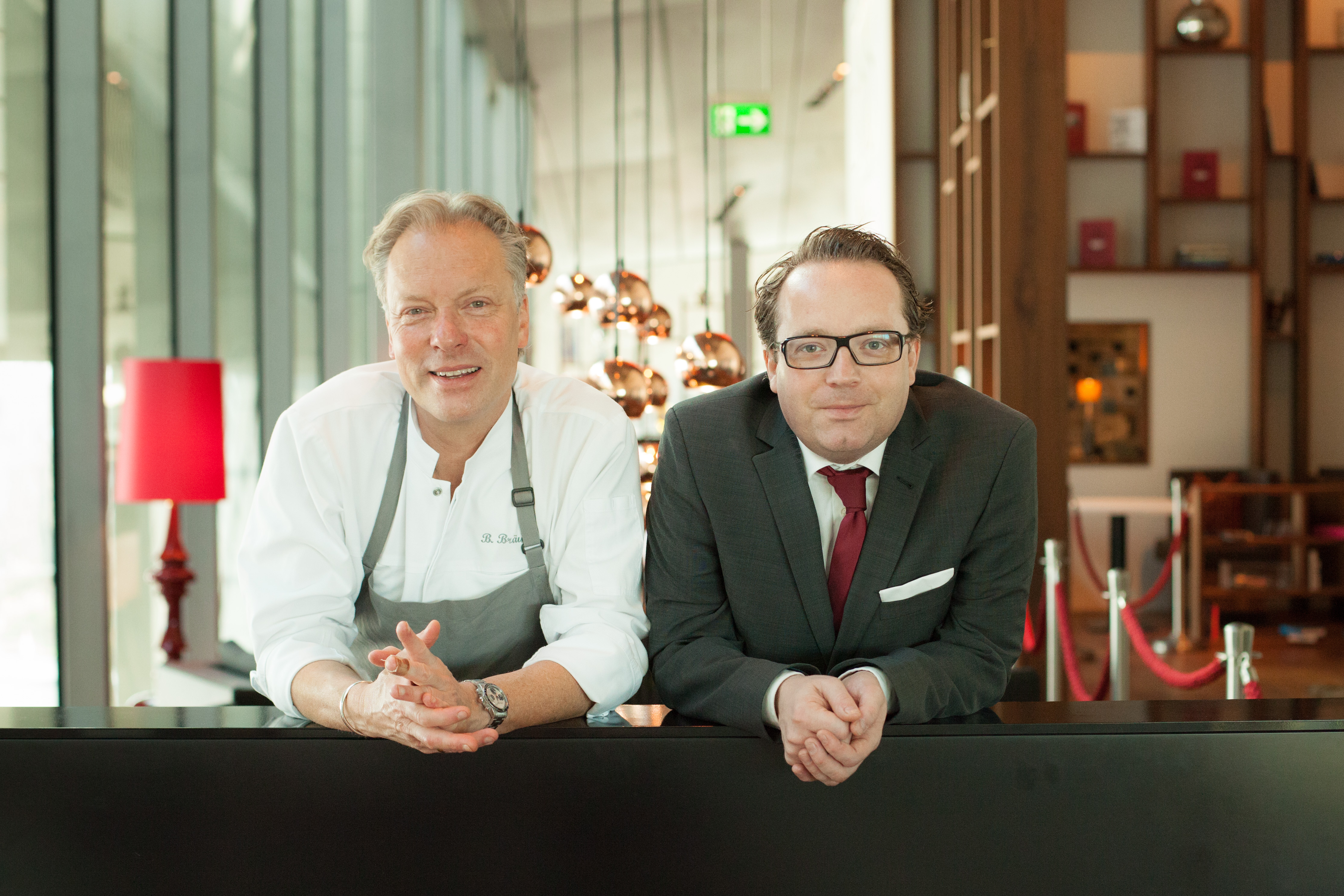 Bobby Bräuer und Frank Glüer, EssZimmer in der BMW Welt by Käfer, München